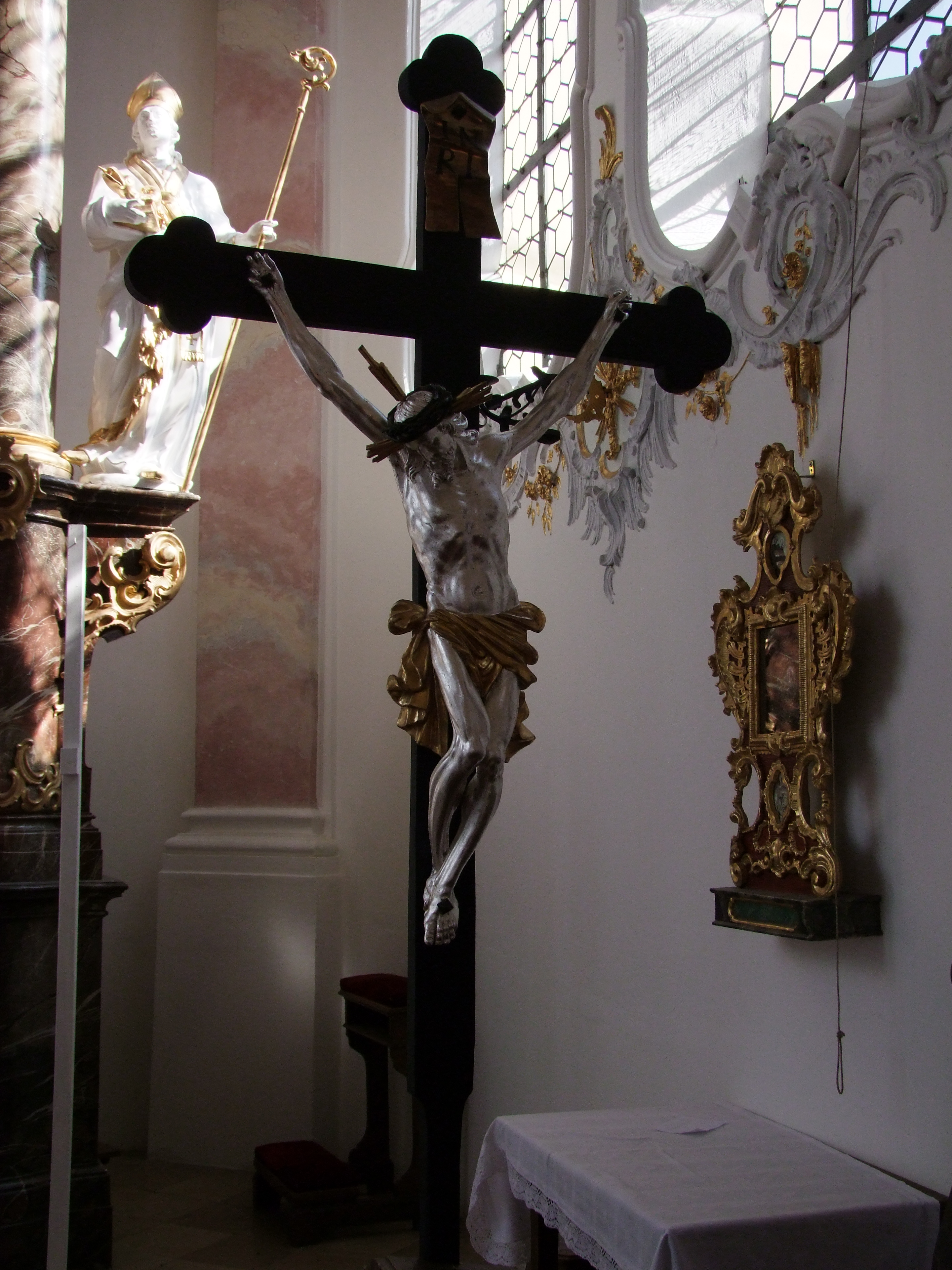 St. Magnus in Unterrammingen in Oberschwaben